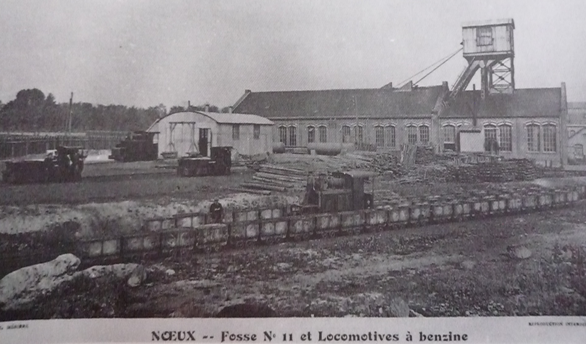 La Fosse n° 11 de la Compagnie des mines de Nœux était un charbonnage constitué d'un seul puits situé à Fouquières-lès-Béthune, Pas-de-Calais, Nord-Pas-de-Calais, France.